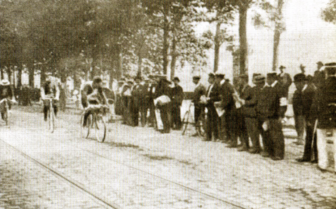 Tour de France 1903. Home straight of the first stage. Die Zielgerade der ersten Etappe. La dernière ligne droite de la première étape. La recta final de la primera etapa. Финишная прямая первого этапа в Лионе.